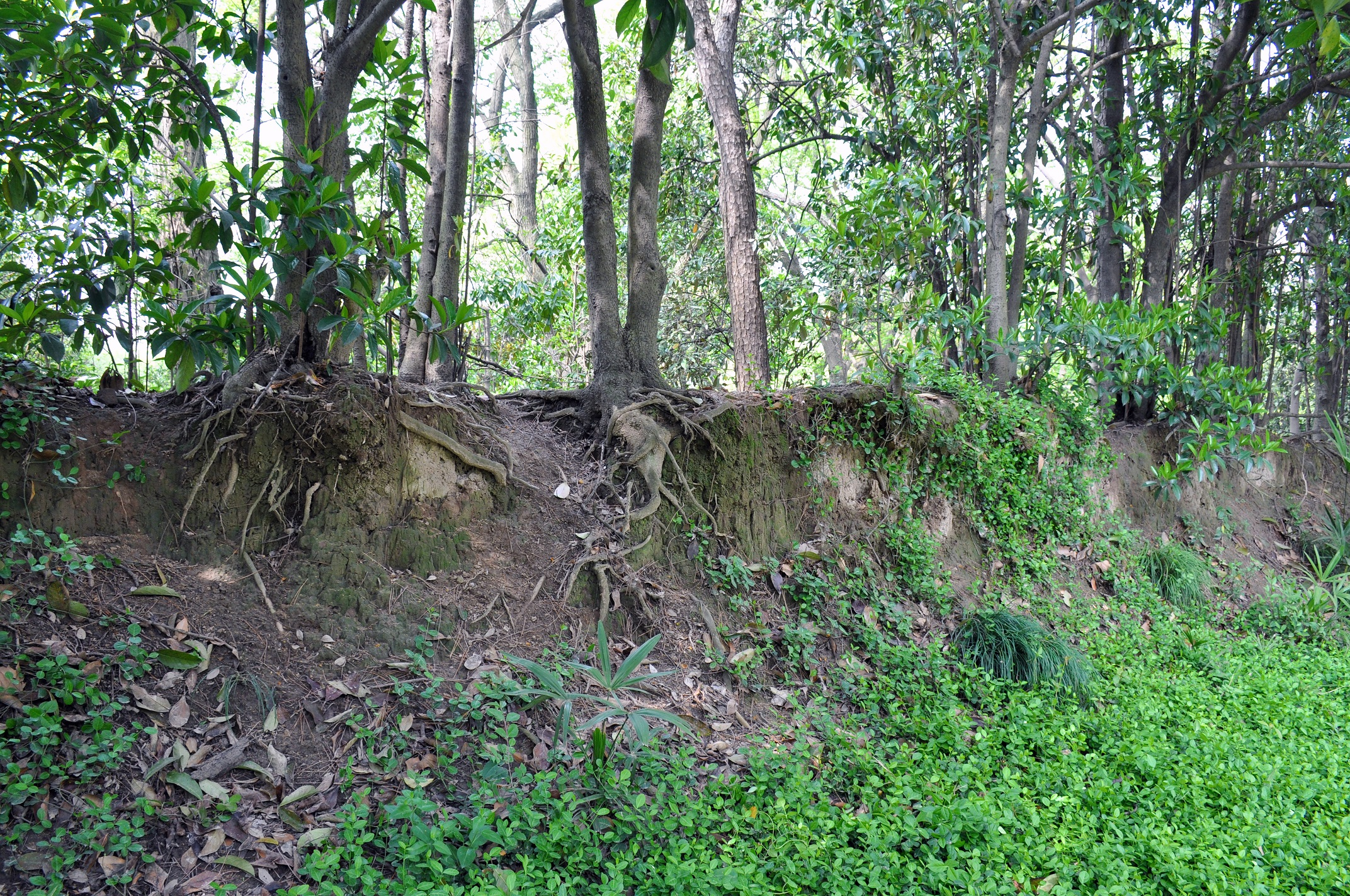 宝山城墙遗址 友谊路街道友谊路1号